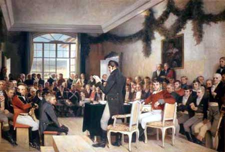 Verfassungsgebende Nationalversammlung von Eidsvoll in Norwegen Gemälde von 1814 Public Domain